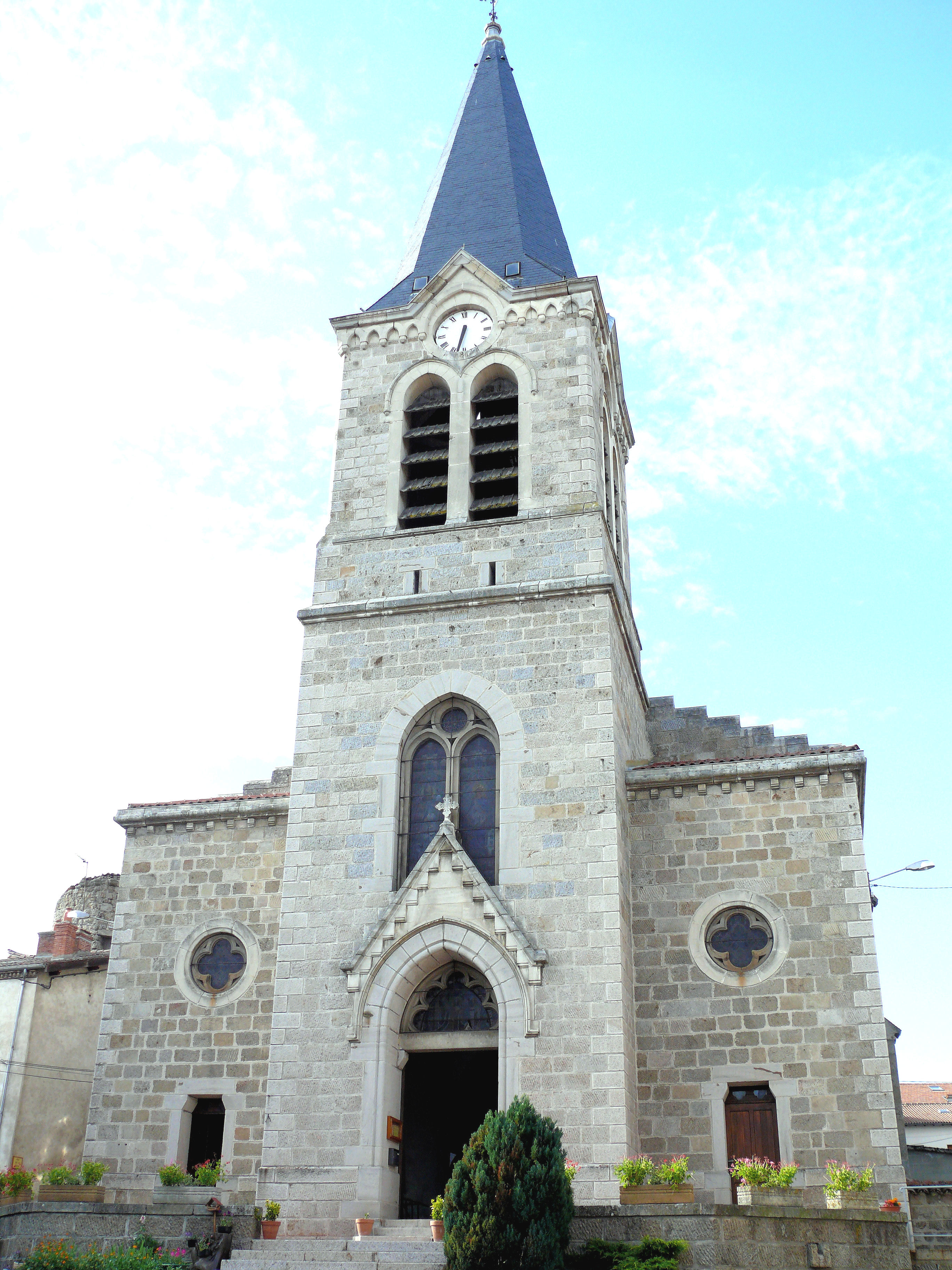 Estivareilles (Loire) - Eglise Saint-Pierre-aux-Liens